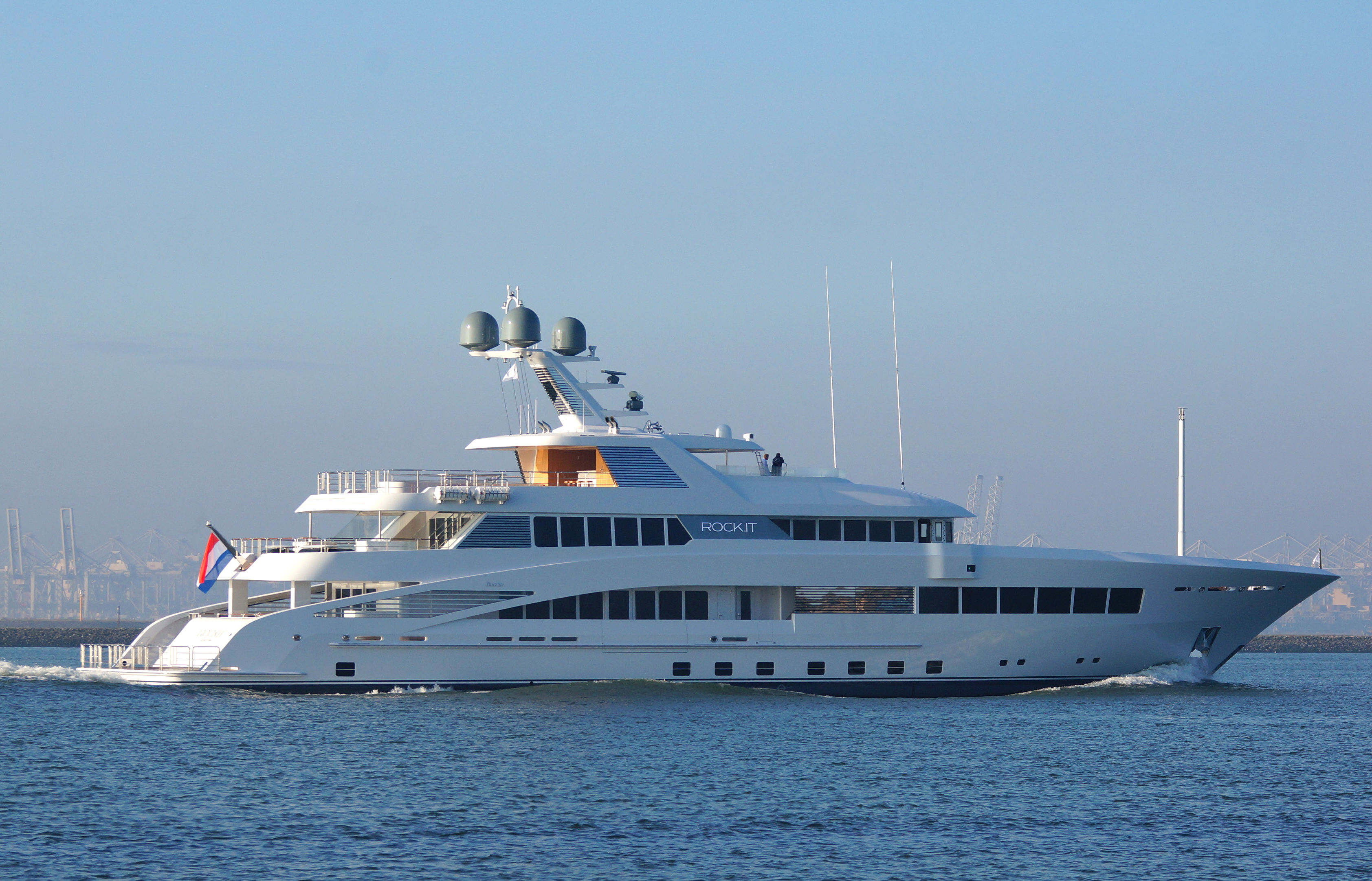 Nieuwe Waterweg 3-10-2014 . Aanvang proefvaart op de Noordzee. Gebouwd bij Feadship in Aalsmeer 2014.